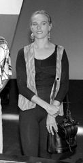 Bettine Vriesekoop